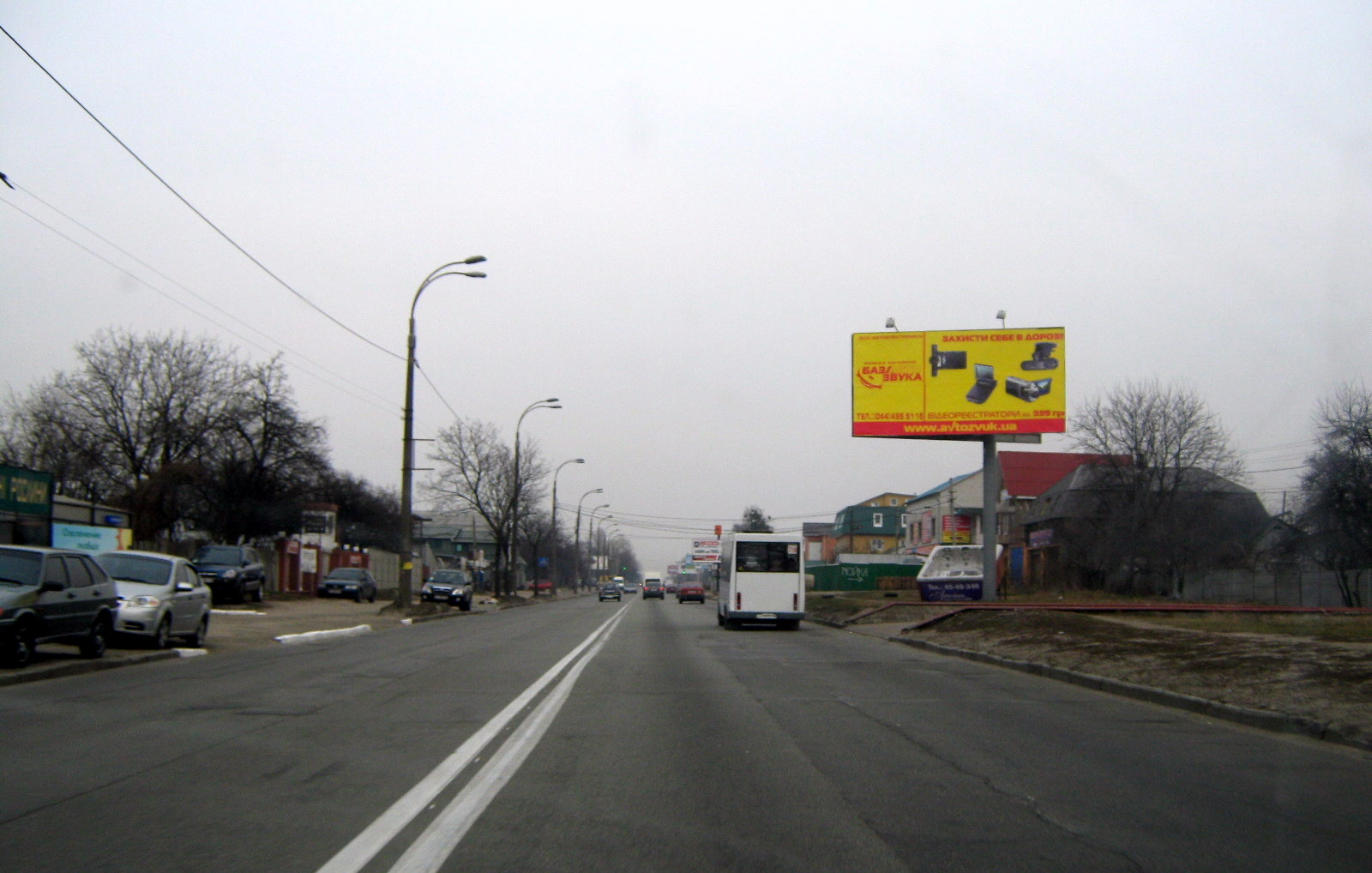 Вулиця Стеценка в Києві